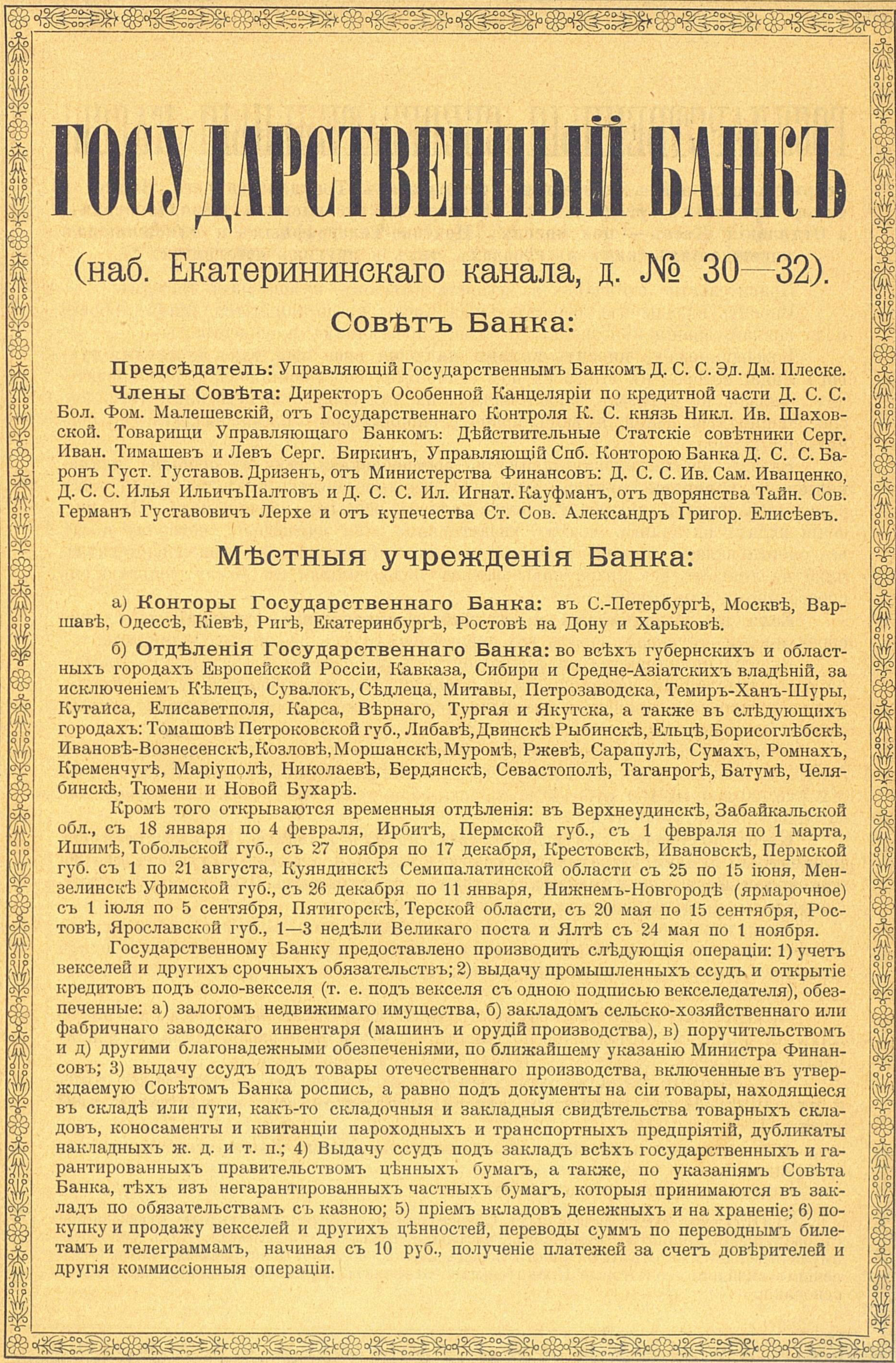 Реклама услуг Государственного банка Российской империи, 1896 год.